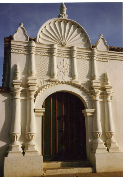 Quartiere Coloniale di Coro Palazzo dalle Finestre di ferro